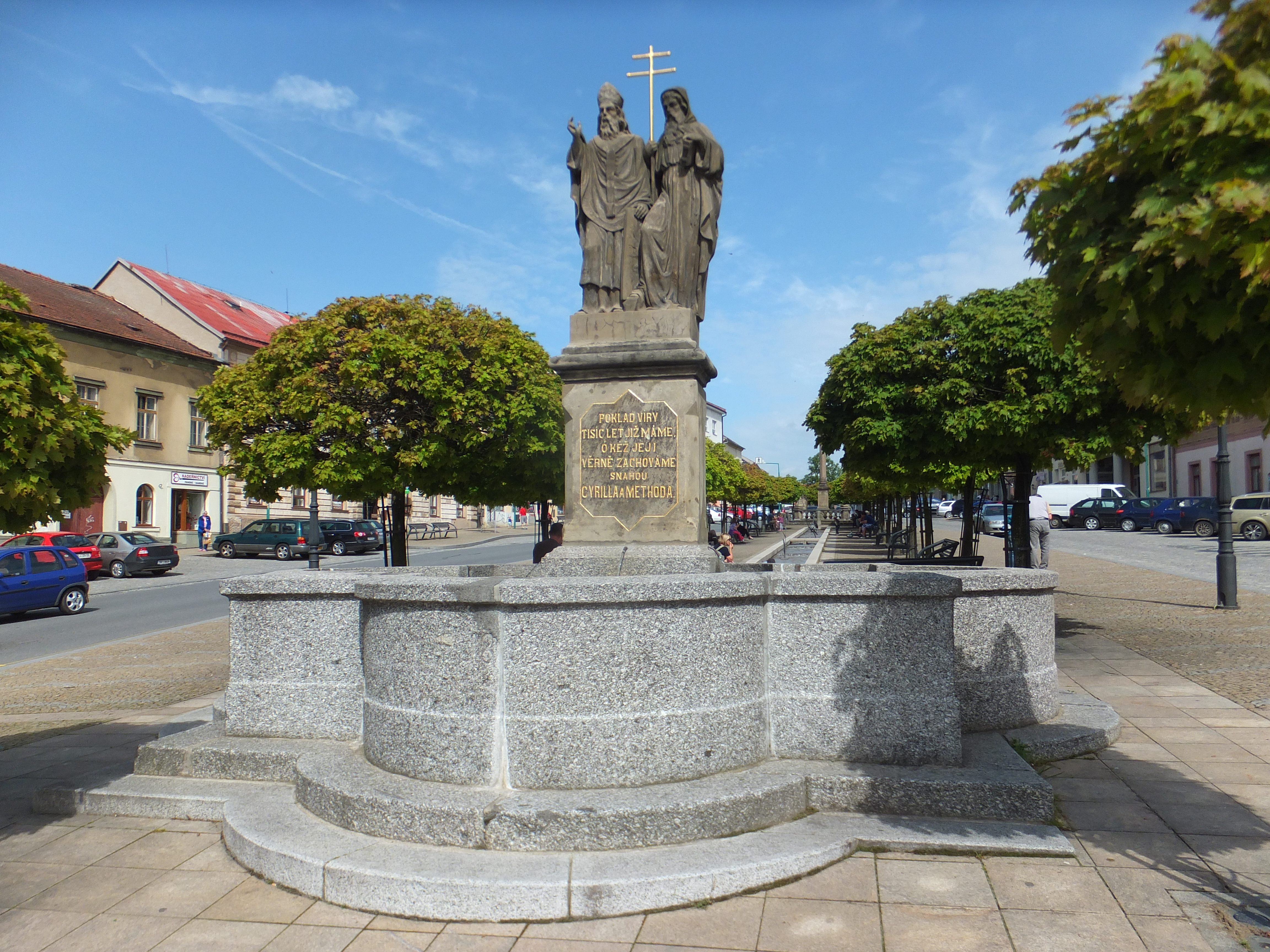 Kašna se sousoším svatých Cyrila a Metoděje na náměstí v Bystřici nad Pernštejnem